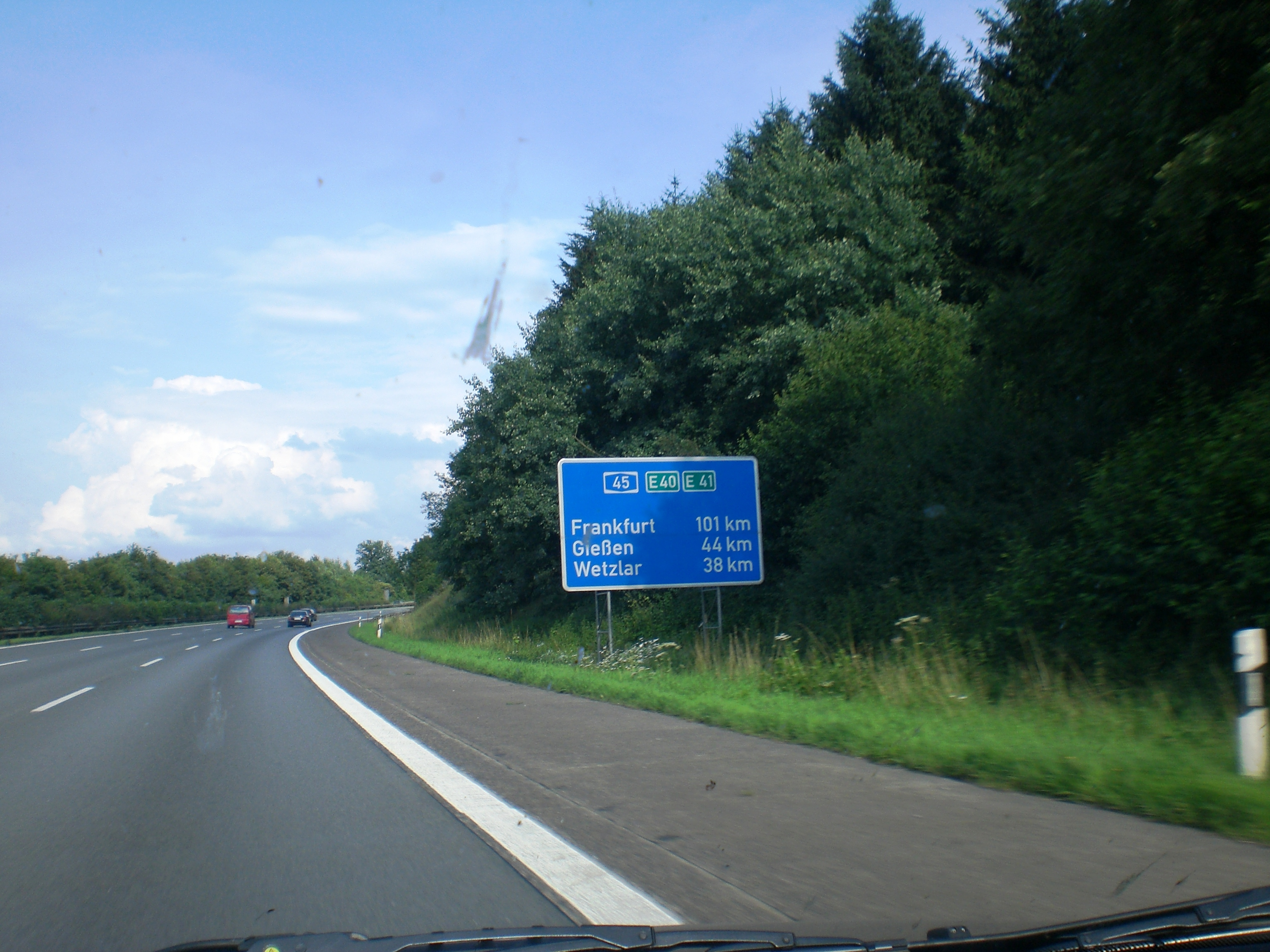 Die A45 bei Dillenburg in Richtung Süden